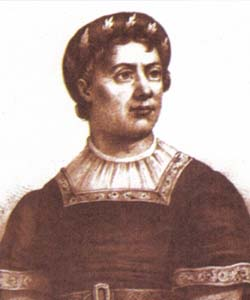 Summary Regente do Reino Licensing 18:58, 27 Fevereiro 2006 L Gonçalves 250x300 (23334 bytes) (Regente do Reino)